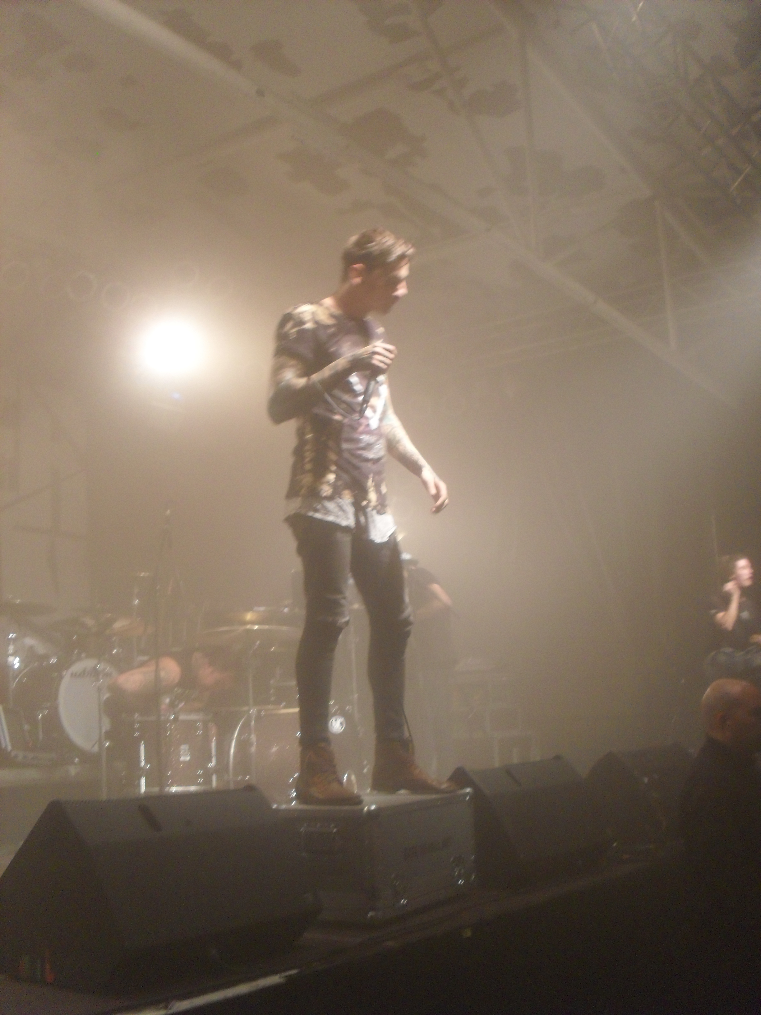 Sänger Marcel Gadacz von Dream On auf der Bühne in der Essigfabrik in Köln.